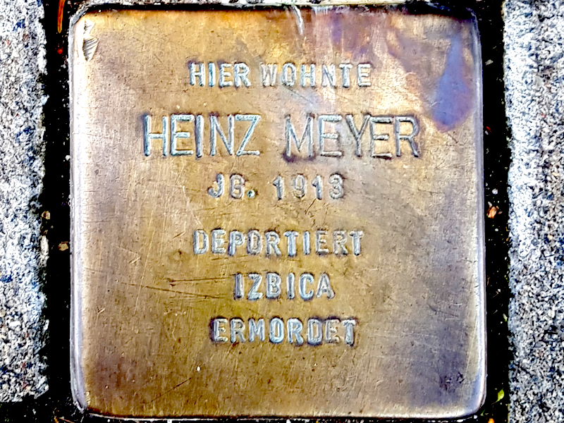 Stolperstein für Heinz Meyer, Jg. 1913, deportiert ins KZ Izbica, ermordet